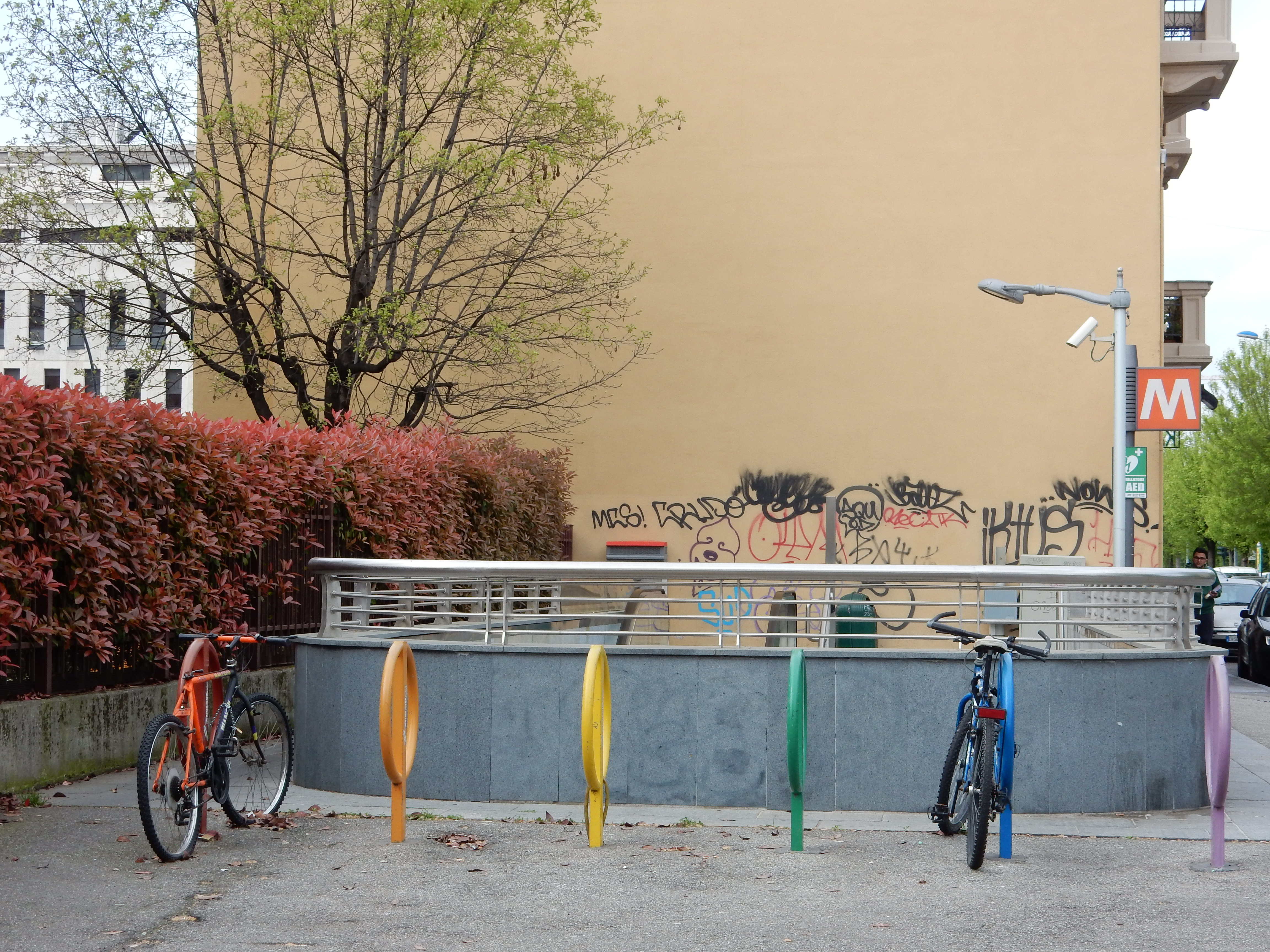 Ingresso stazione Paradiso